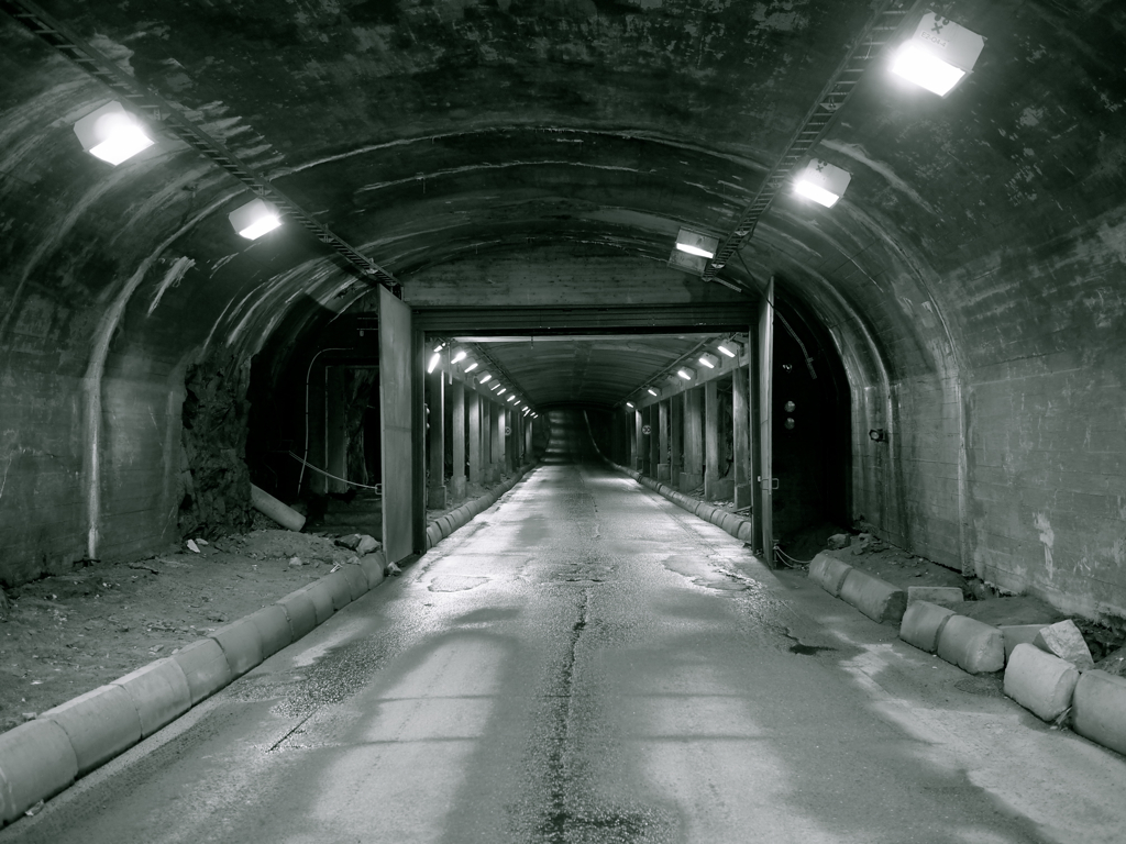 Spiralen